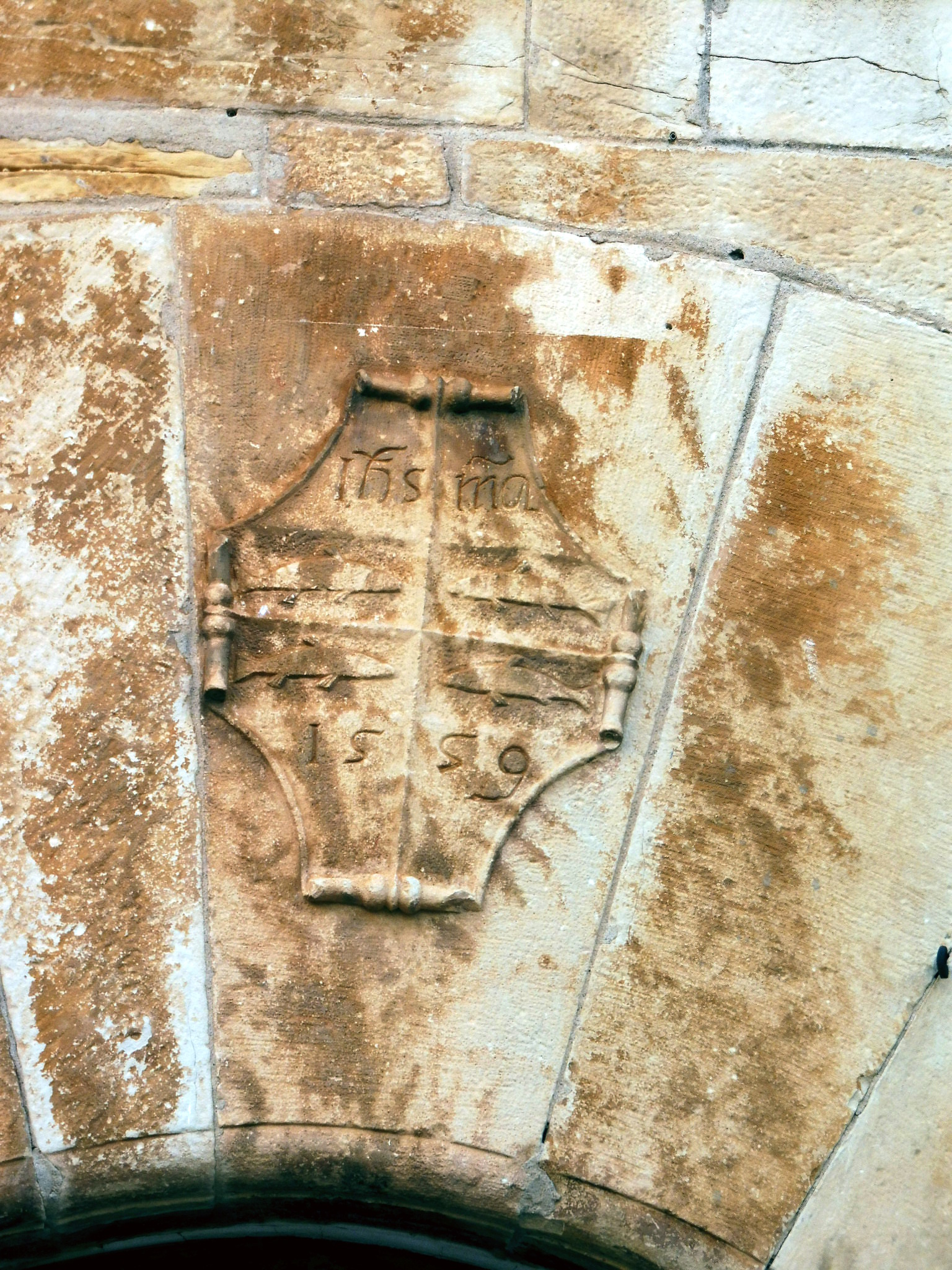 Cal Xamà de Preixana: clau del porrtal